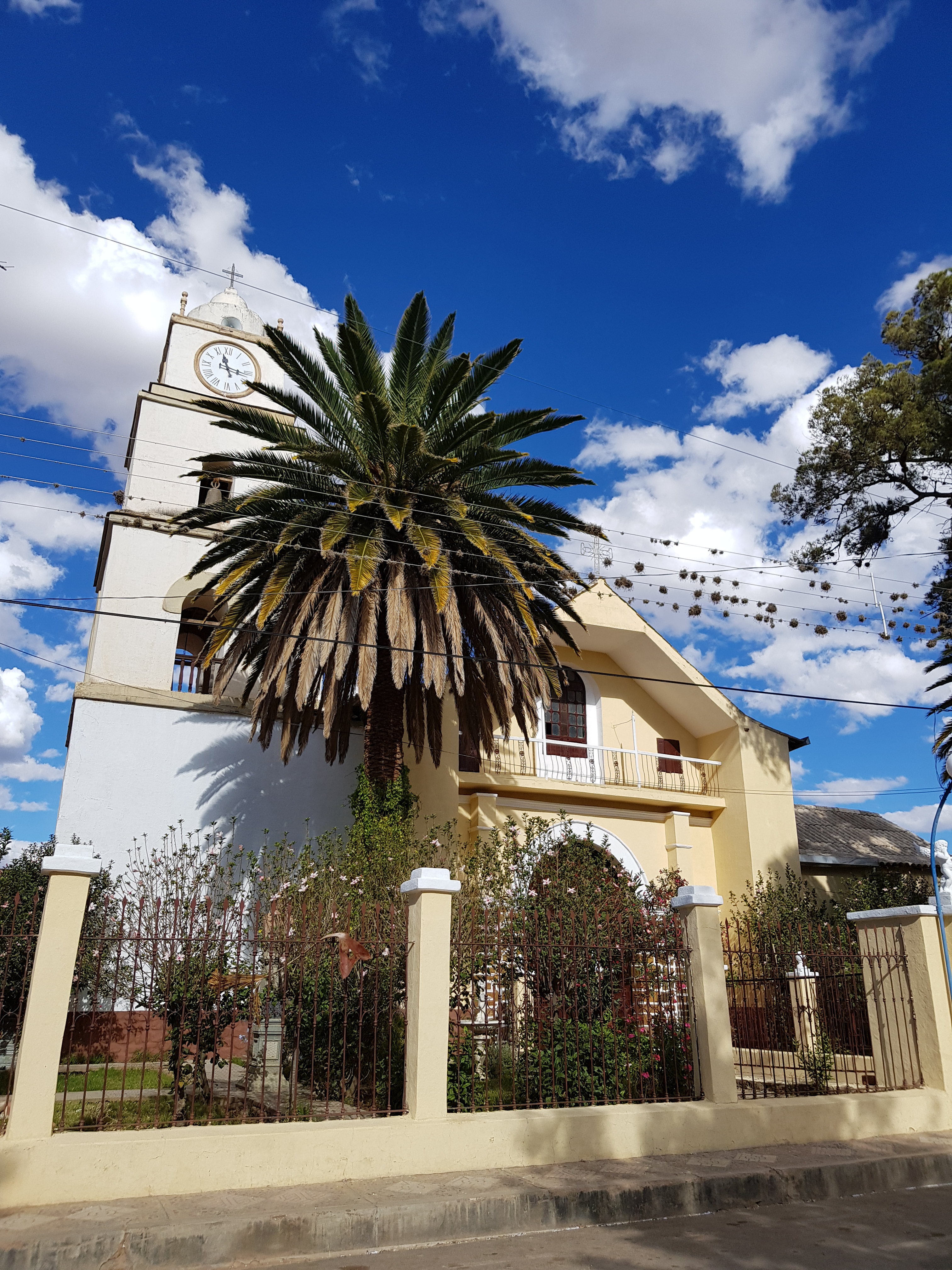 Templo de San Miguel de Toco This medium shows the protected monument with the number C/00-387 in Bolivia.